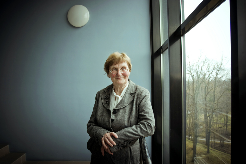 Ene-Margit Tiit oma 76.-dal sünnipäeval 22. aprillil 2010.